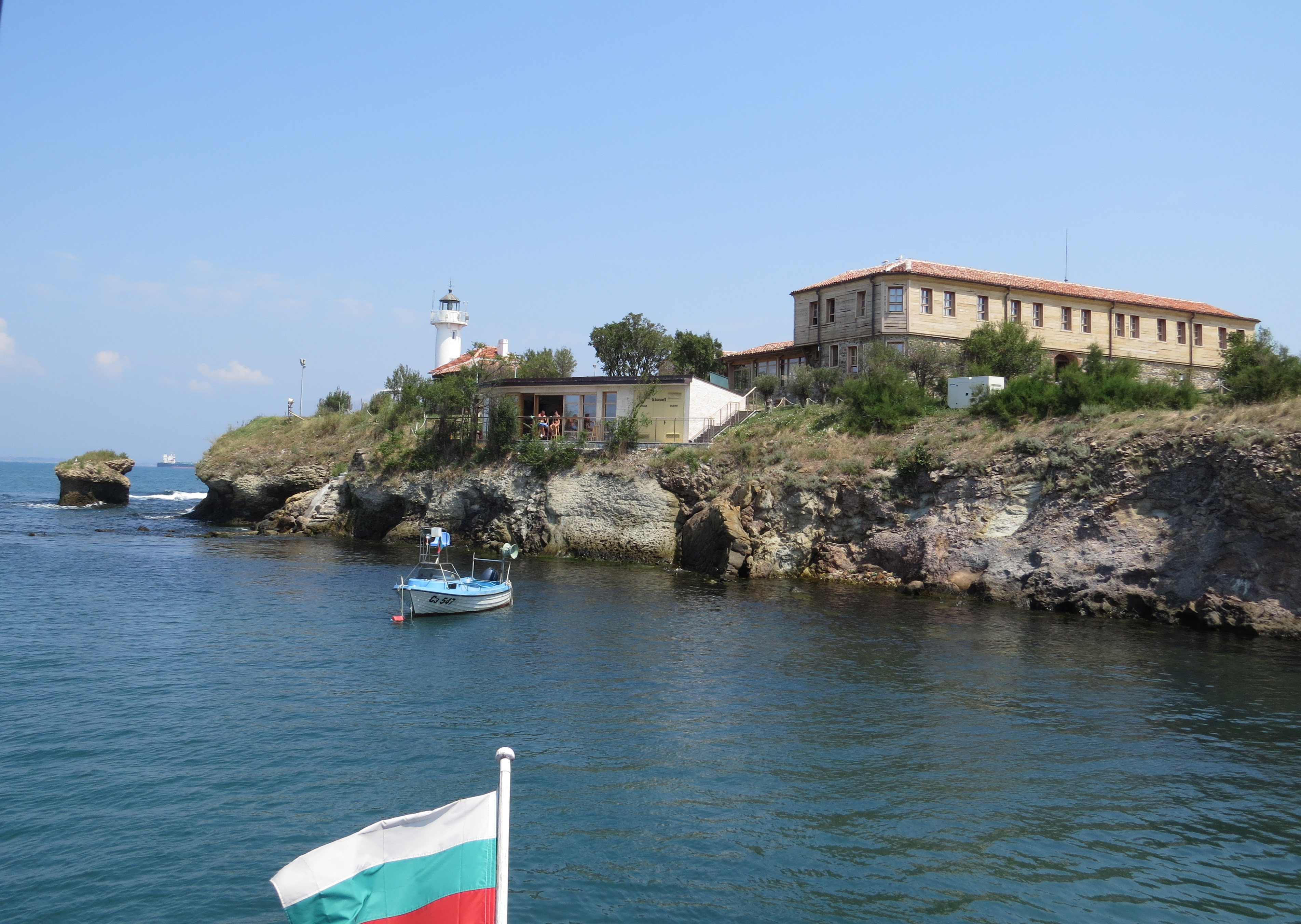 Остров Святой Анастасии